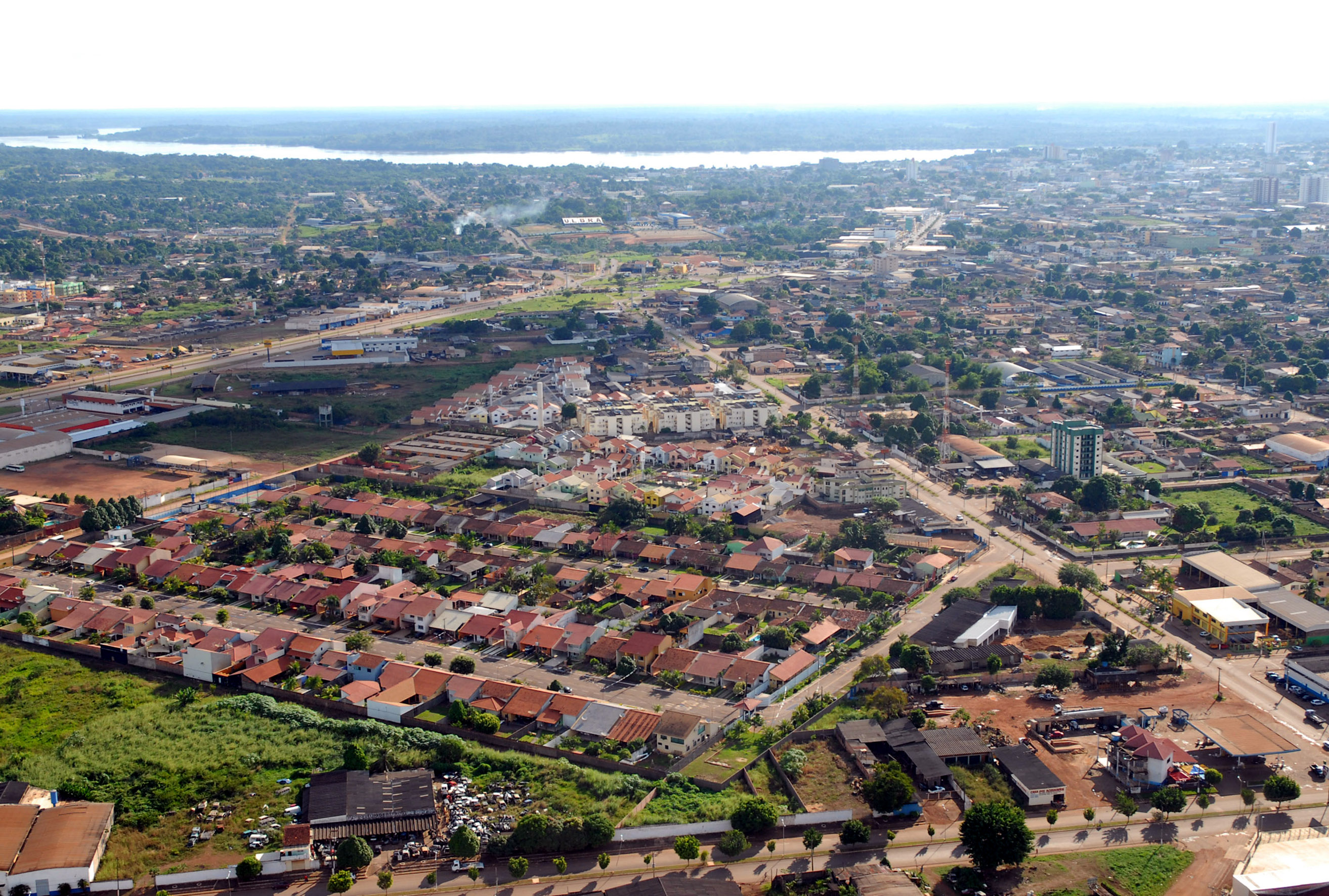 Porto Velho, Rondônia - vista aérea da capital de Rondônia. Ao fundo, o Rio Madeira.